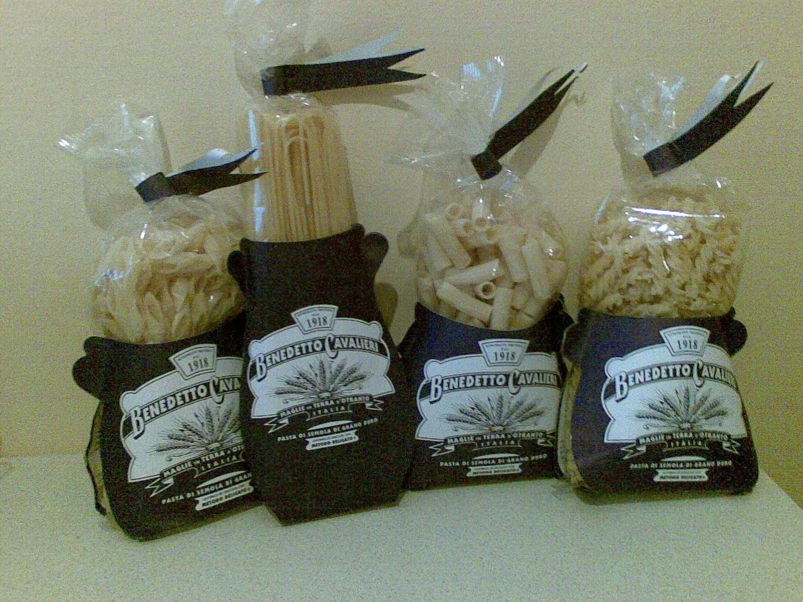 Differenti formati di pasta Benedetto Cavalieri.